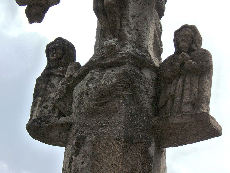 details de la croix de Vitrolles